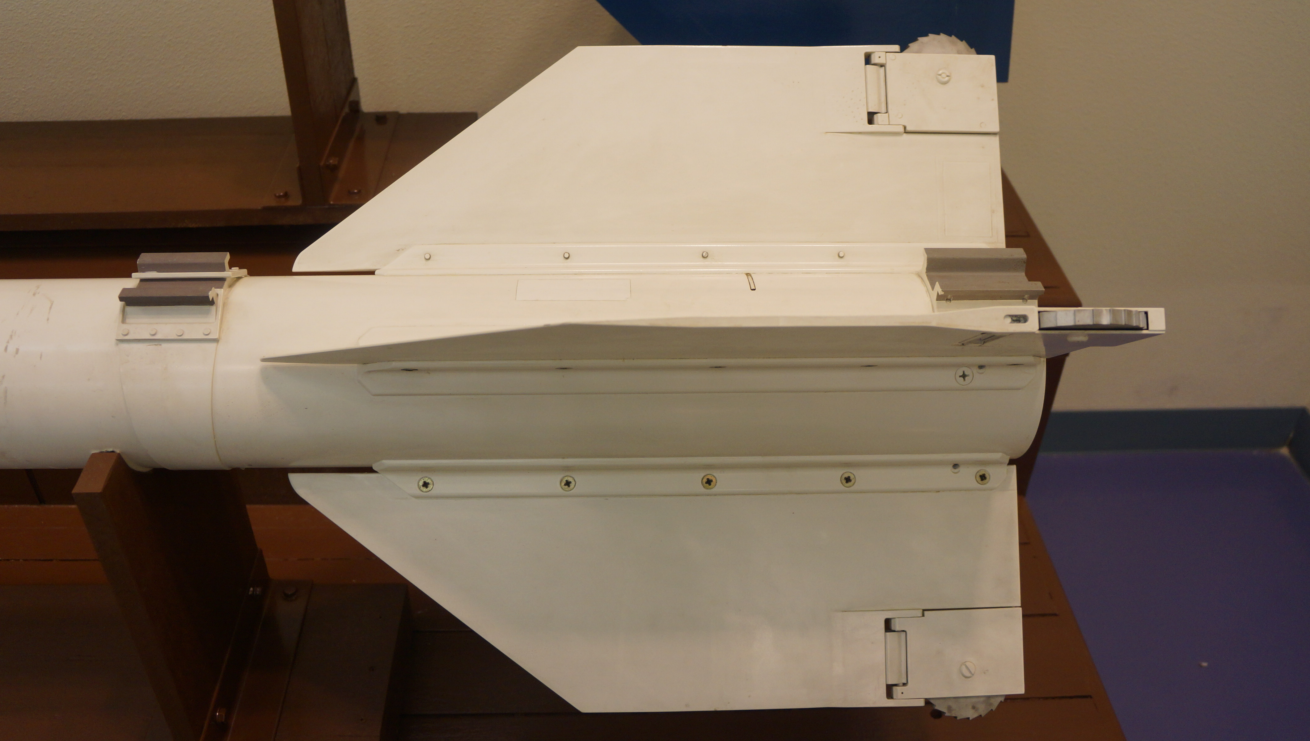 航空自衛隊 69式空対空誘導弾（AAM-1 ）実物大模型 操舵翼。 13年4月6日 航空自衛隊奈良基地資料館にて。